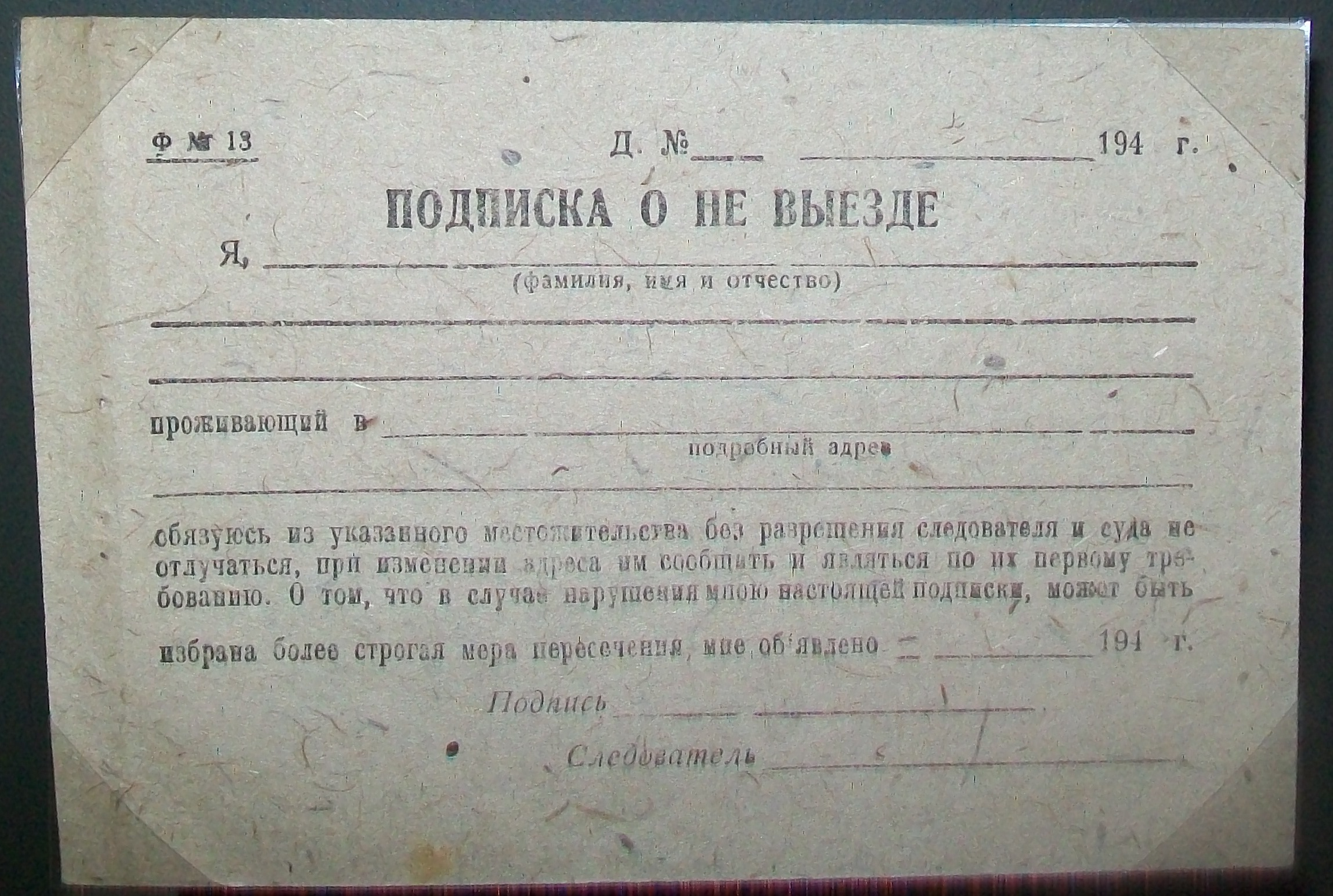 Бланк подписки о невыезде 1940-х годов СССР. Хранится в музее Б.Н. Ельцина, Ельцин-центр, Екатеринбург, май 2017 года